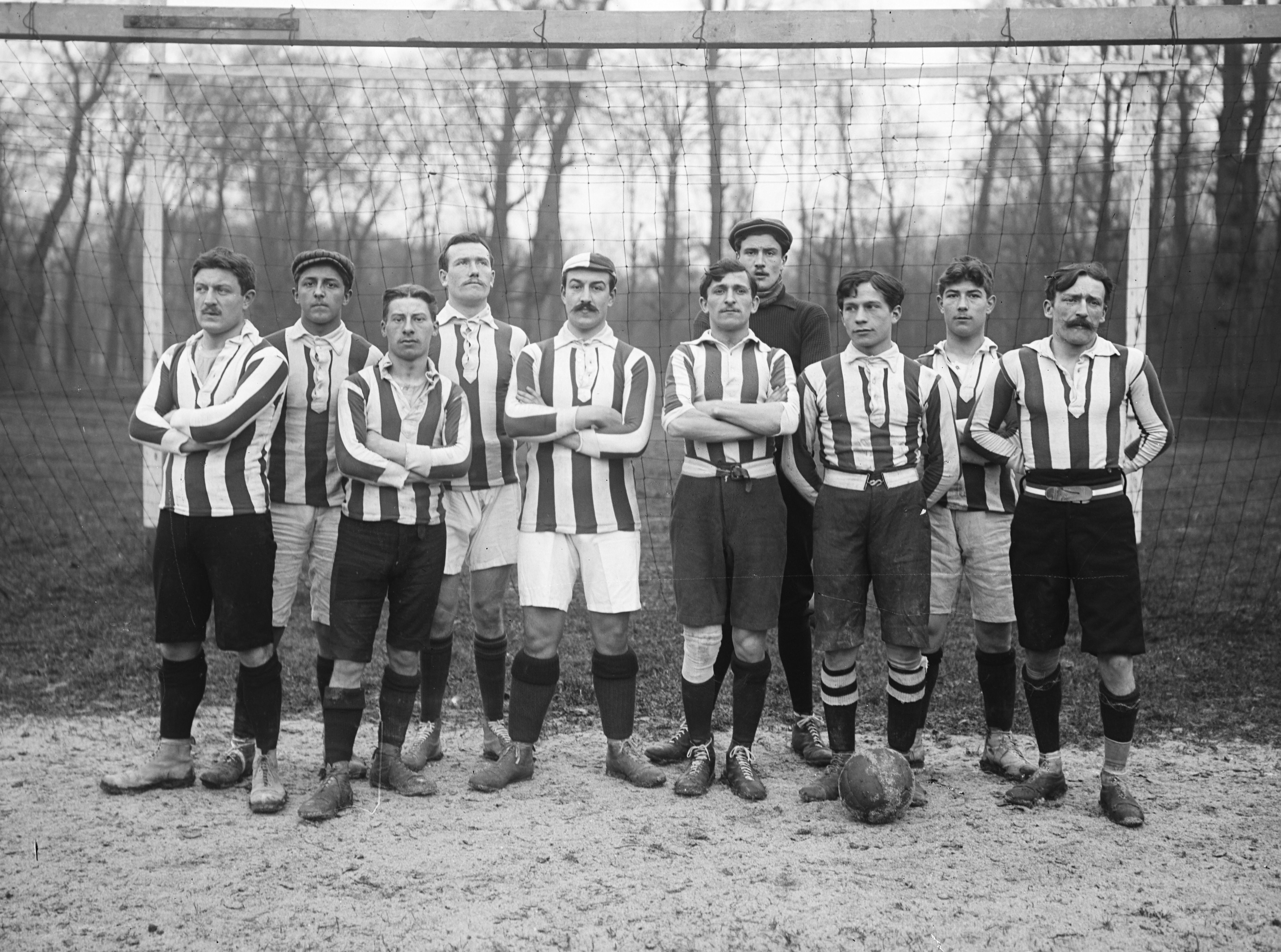 Equipe de football du Red Star Amical Club le 20 décembre 1908 avant son match à St Cloud contre le Stade français, comptant pour le championnat de Paris de deuxième série de l'USFSA. Le Red Star remporte le match 4-3 (source Le Matin du 21/12/1908